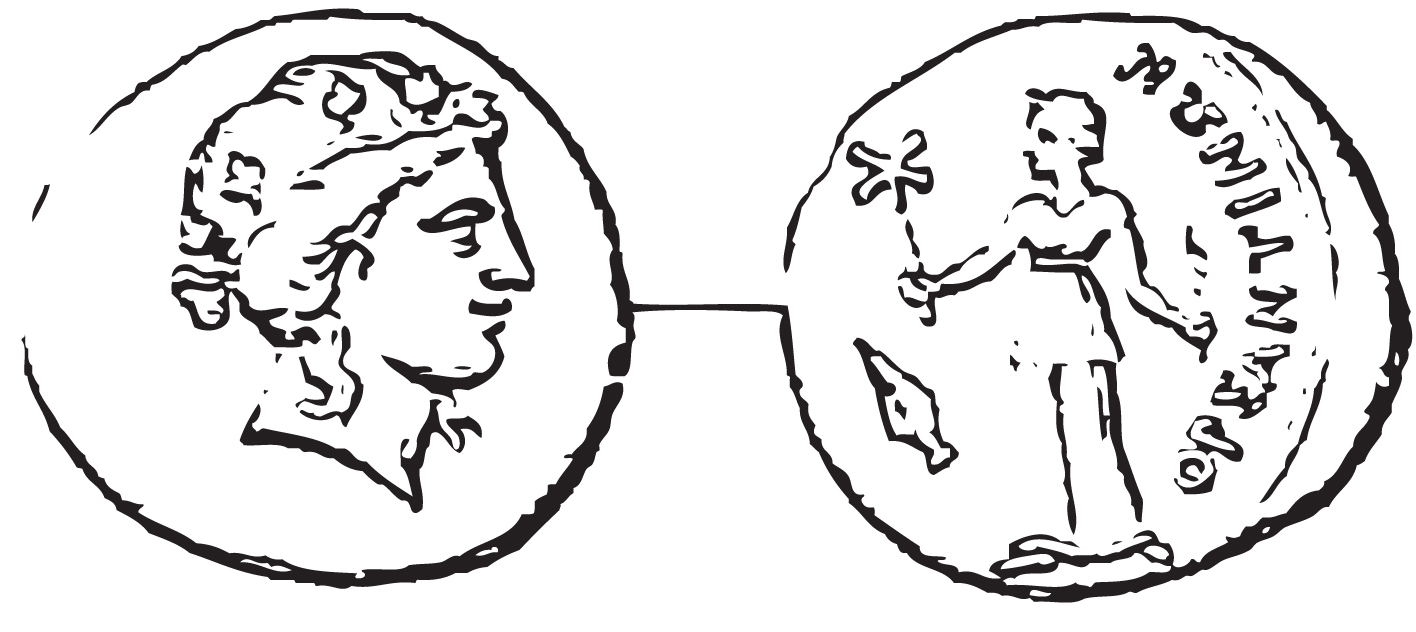 Monnaie d'Ursentum. Profil de Déméter / Déméter portant une torche en croix. D'après Raffaele Garrucci, Le monete dell'Italia antica, 1812-1885, p. 171, pl. CXVIII, 20. Musée de Vienne.